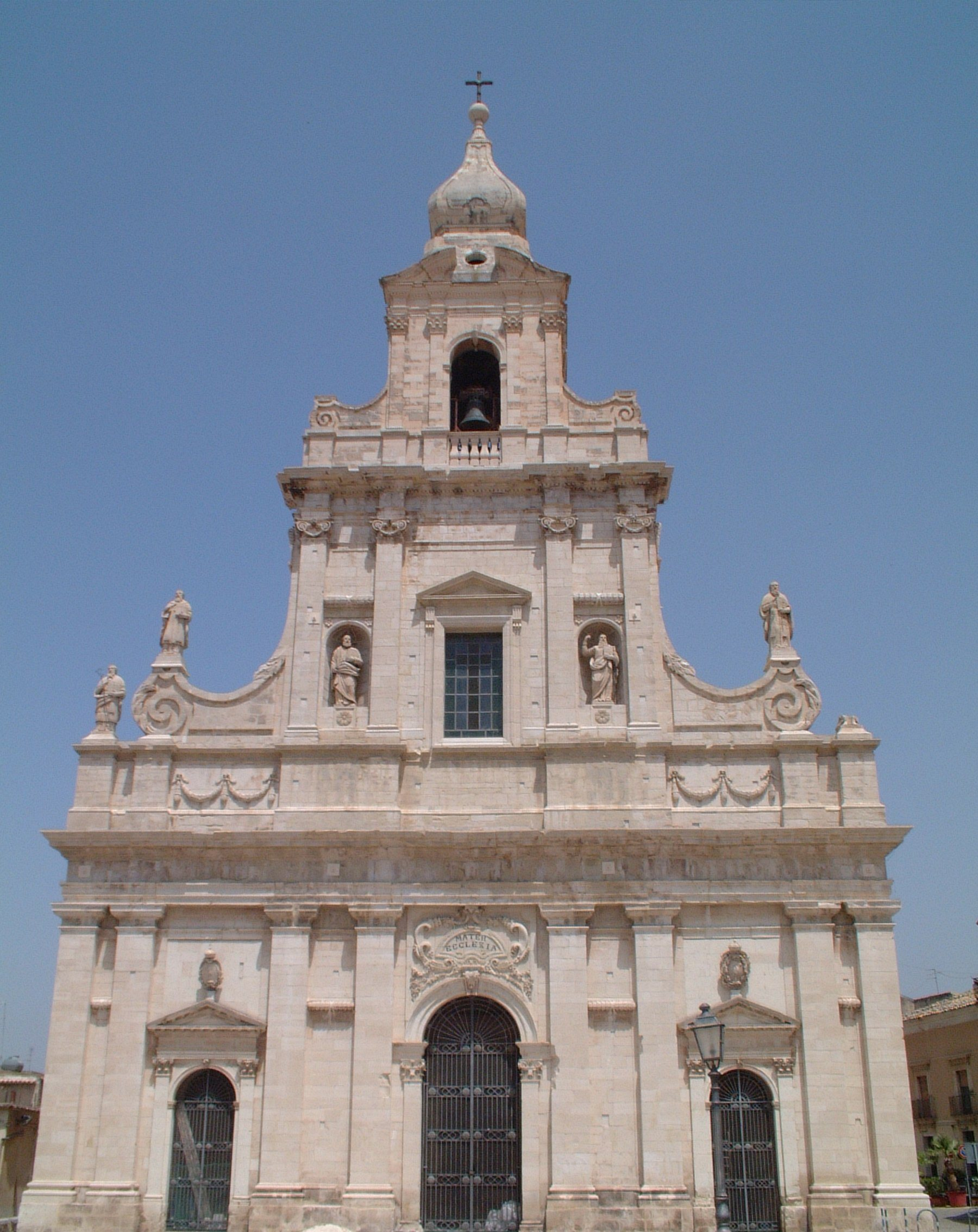 Duomo di Comiso - Chiesa Madre - Santa Maria delle Stelle